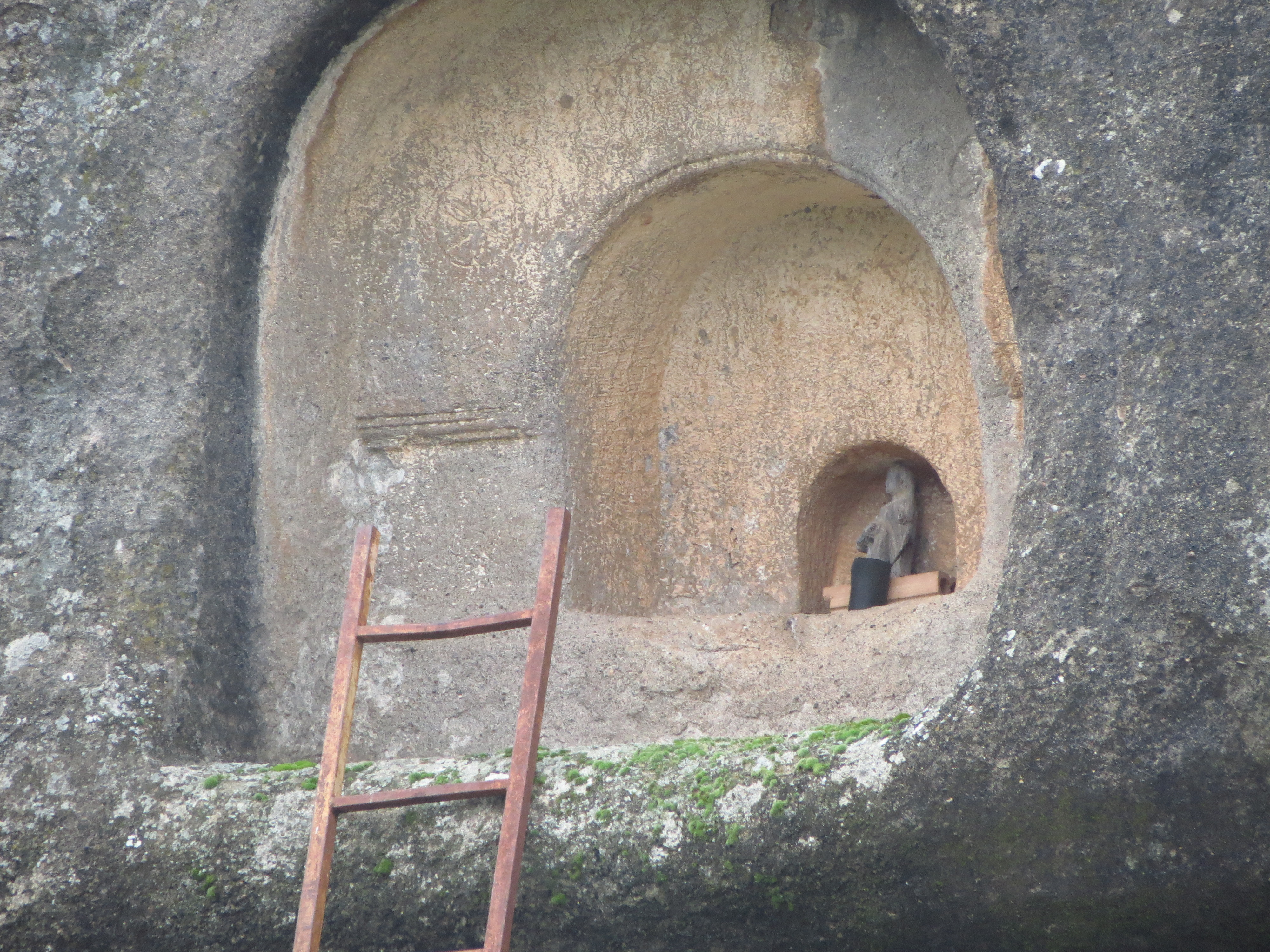 capella a la roca